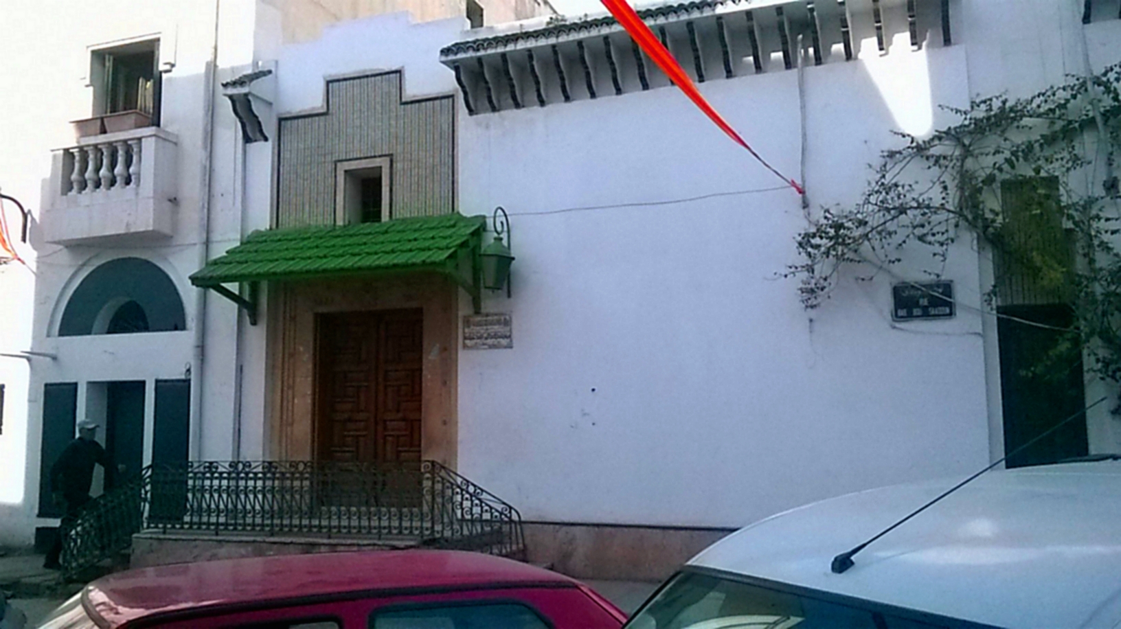 Bab Souika , Tunis باب سويقة, تونس